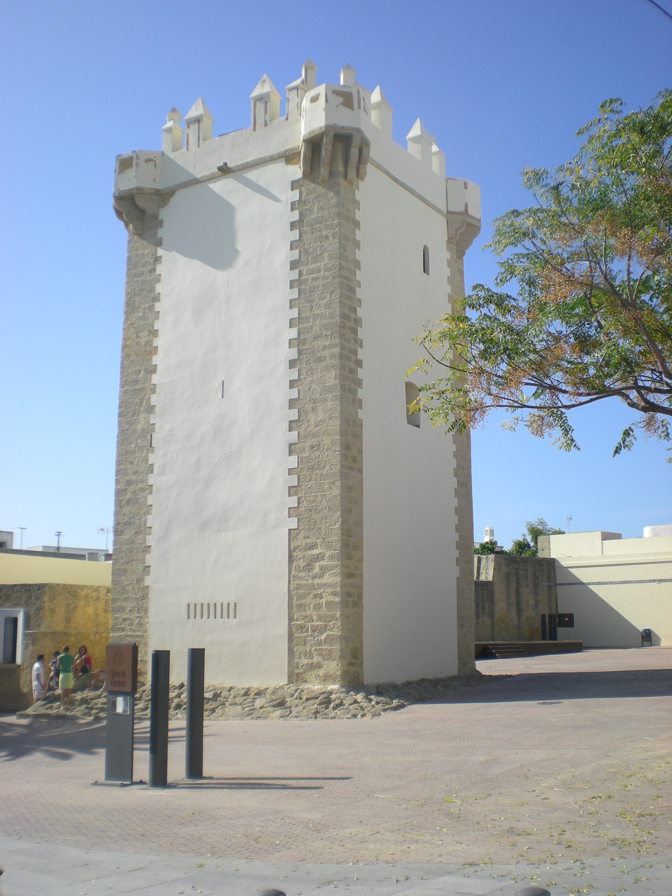 Castillo de Conil de la Frontera Au centre de la ville, la tour Guzman représente l'un des derniers vestiges de la forteresse. Elle fut maintes fois rénovée au fil des siècles.